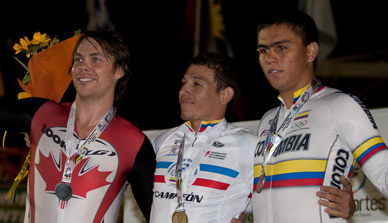 El podio del kilómetro contrarreloj Campeonato Panamericano de Ciclismo de Pista, Medellín. 5 de mayo de 2011.